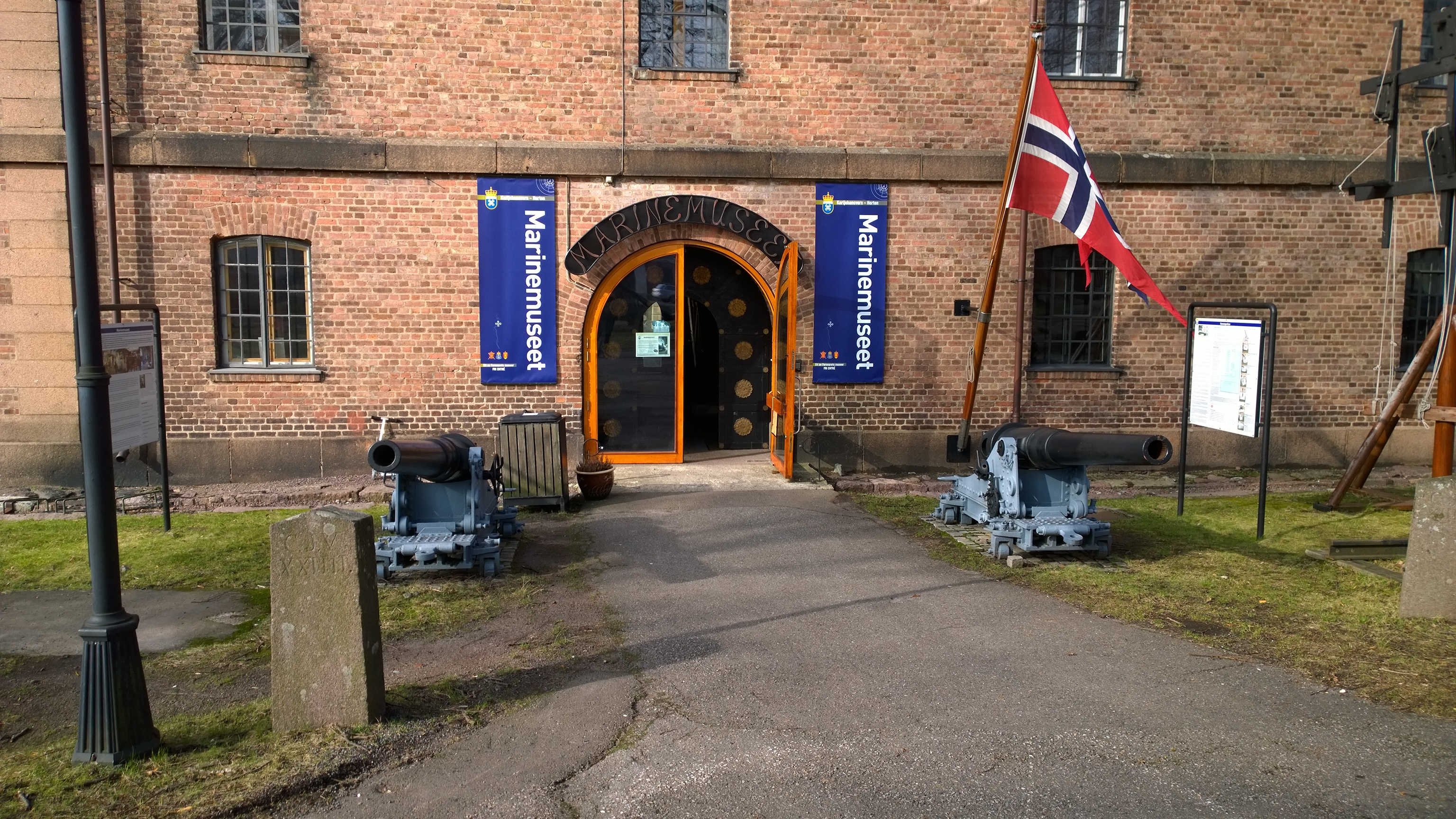 Hovedinngangen til Marinemuseet i Horten.